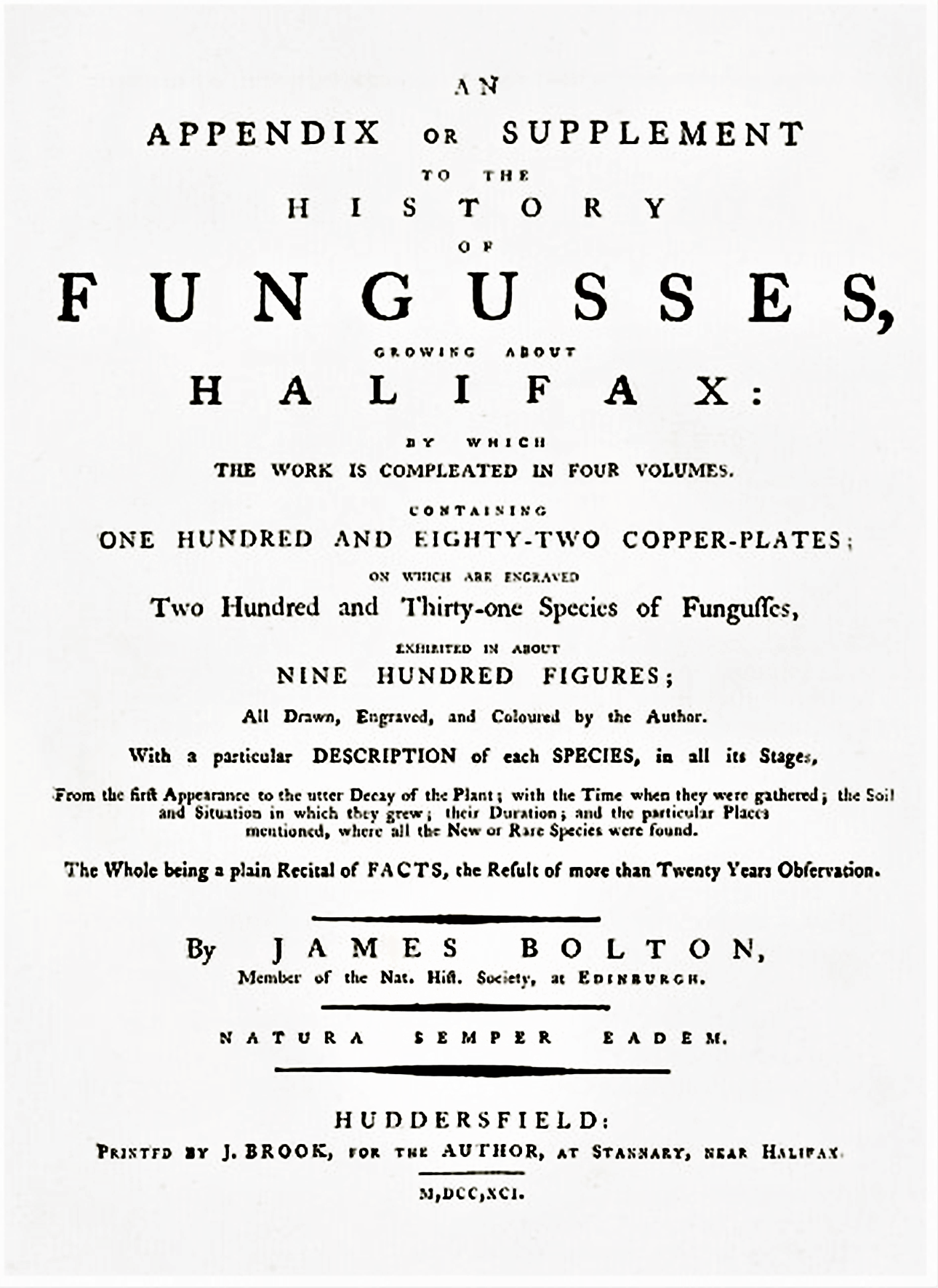 James Bolton: „An History of Fungusses growing about Halifax”, Band 4 (Supplement), Selbstverlag, Huddersfield 1791, Titelseite